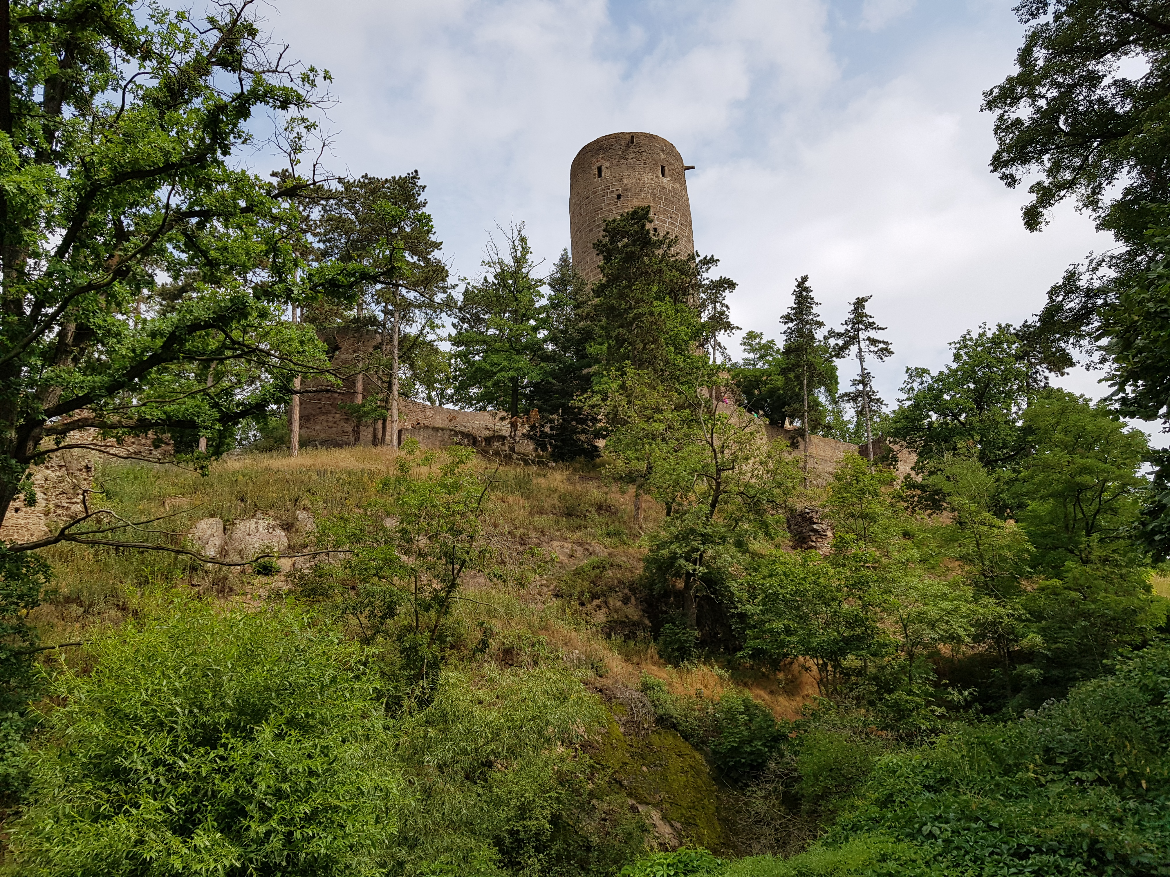 Zřícenina hradu Žebrák